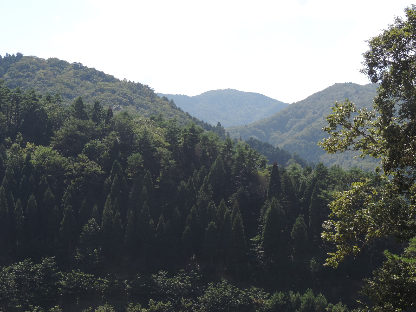 若狭駒ヶ岳（写真中央） 2019年9月撮影